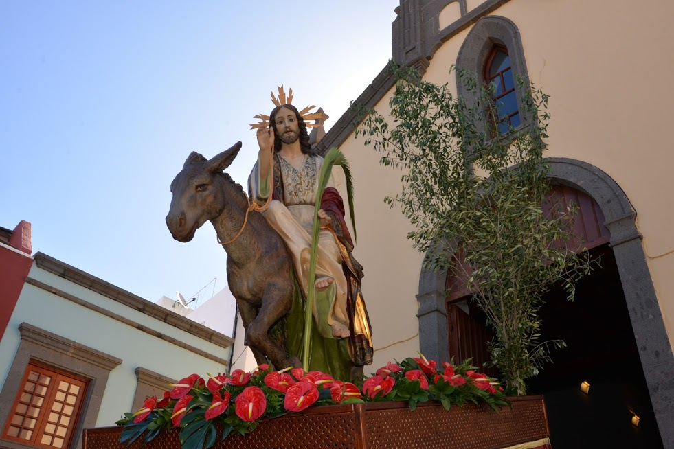 Cristo en La Burrita saliendo de la Ermita de San Roque en Guía